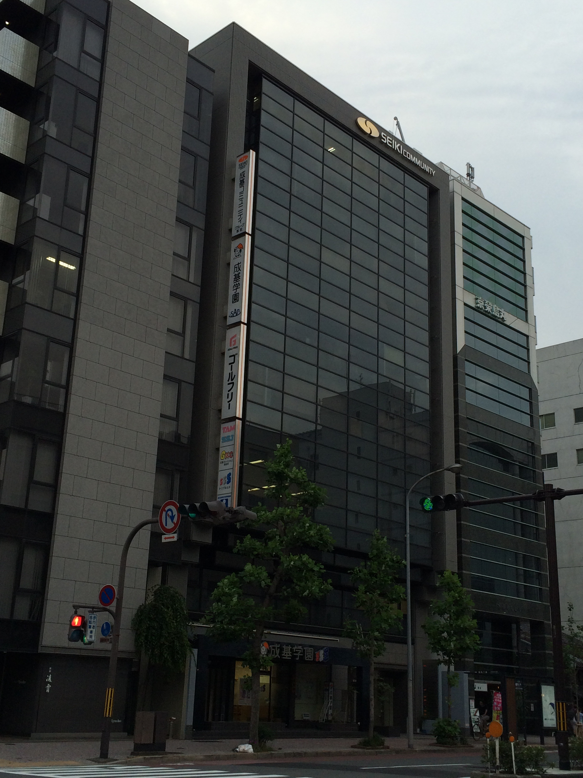 京都府京都市中京区蒔絵屋町にあるSCGビルの写真。